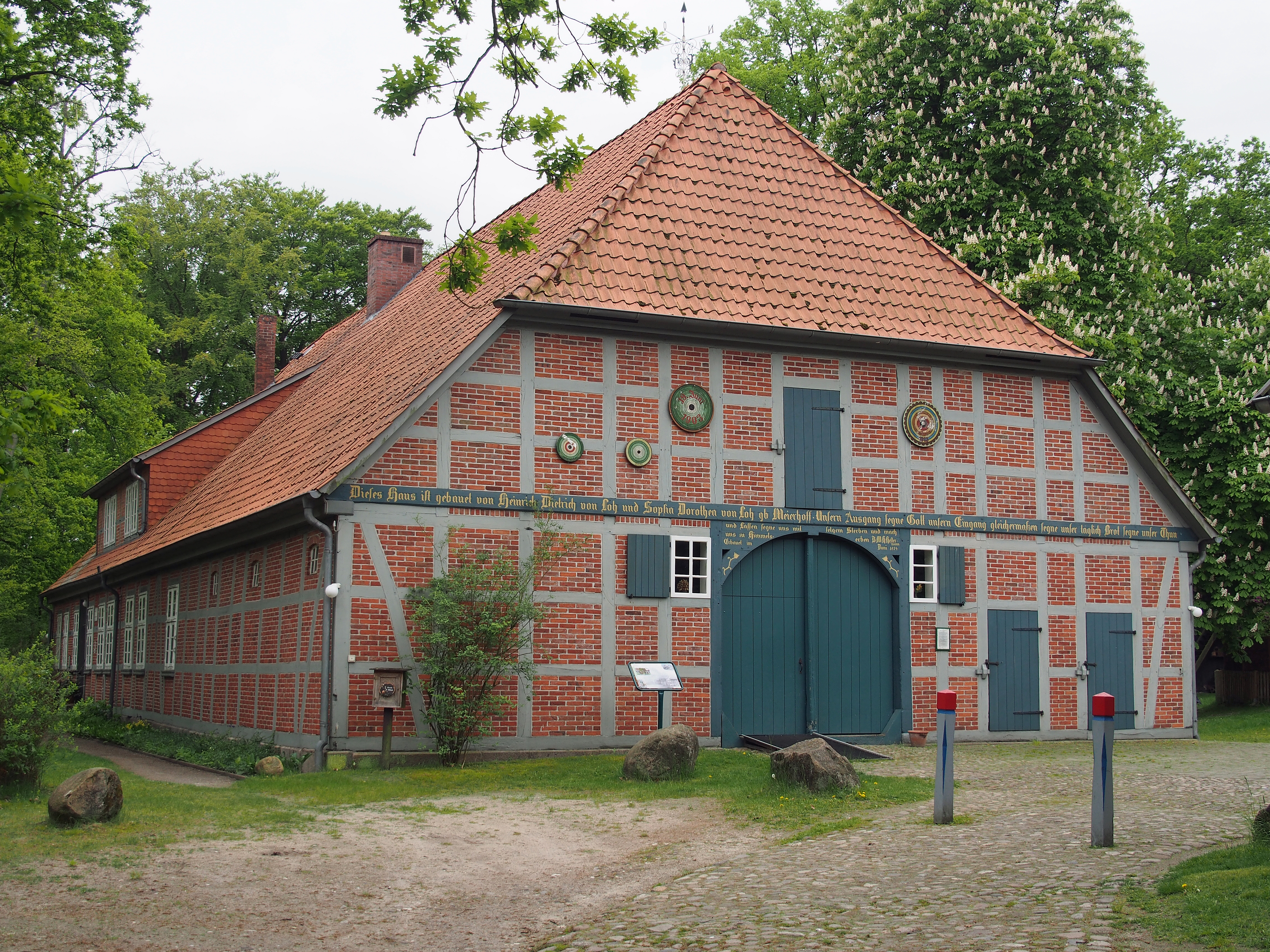 Peetshof in Wietzendorf, Landkreis Heidekreis, Lüneburger Heide